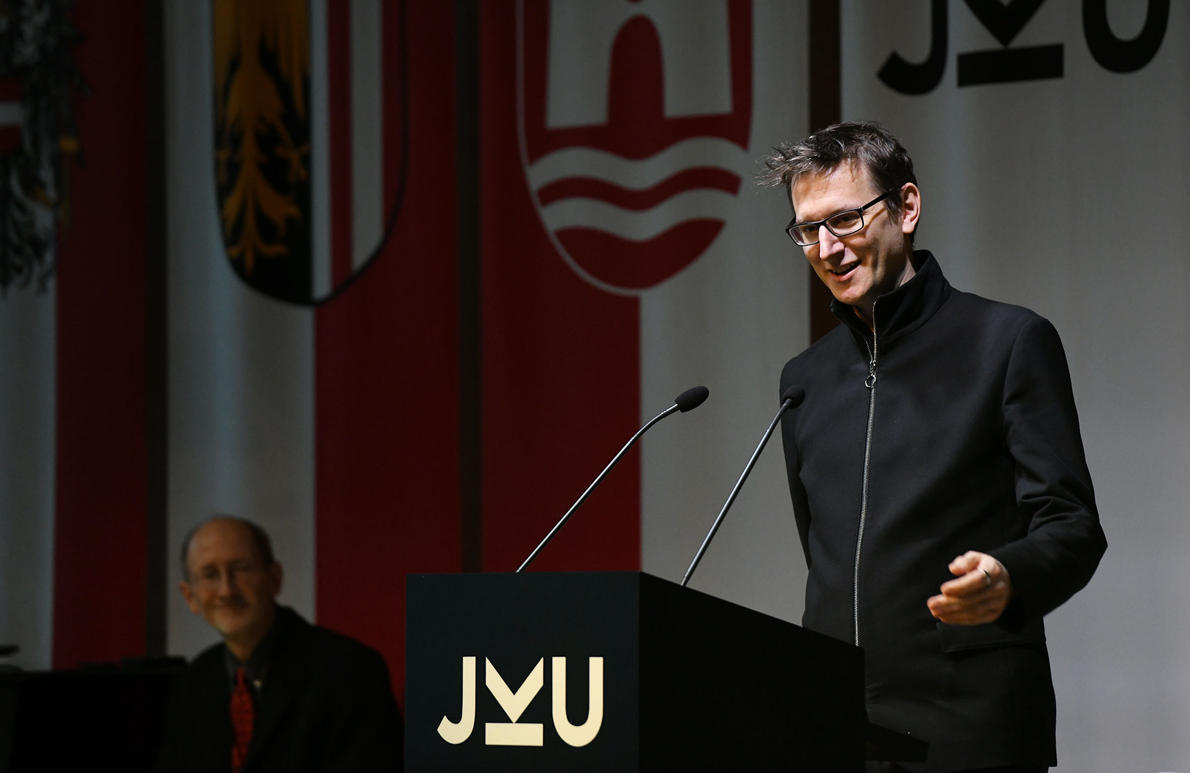 Christopher Lindinger bei einem Vortrag an der Johannes Kepler Universität Linz